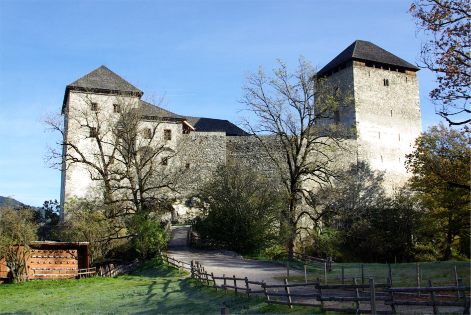 Burgruine Kaprun